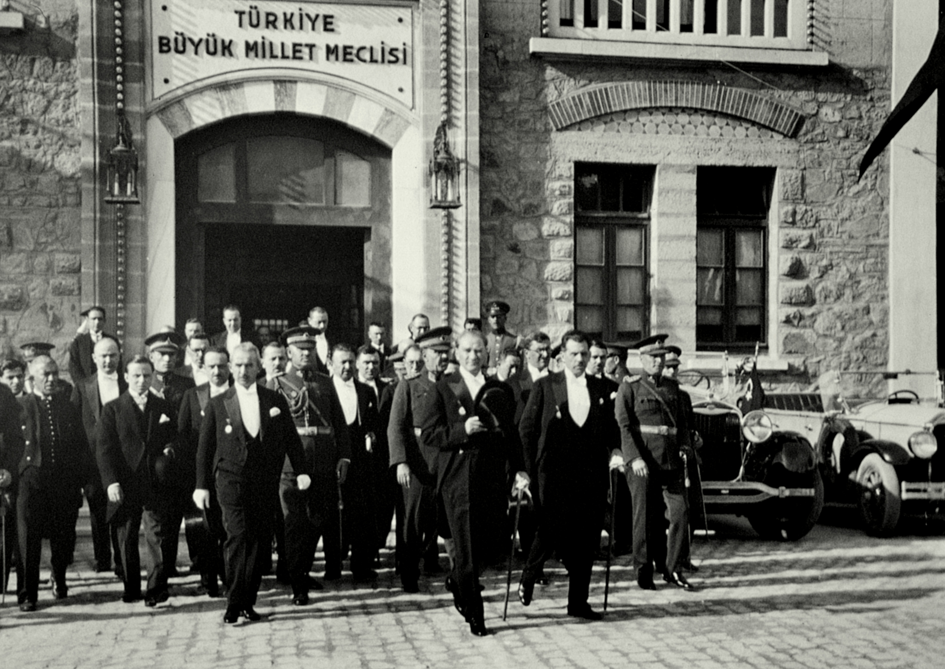 Mustafa Kemal Atatürk, İsmet İnönü ve Fevzi Çakmak, Türkiye Büyük Millet Meclisi'nden çıkarken